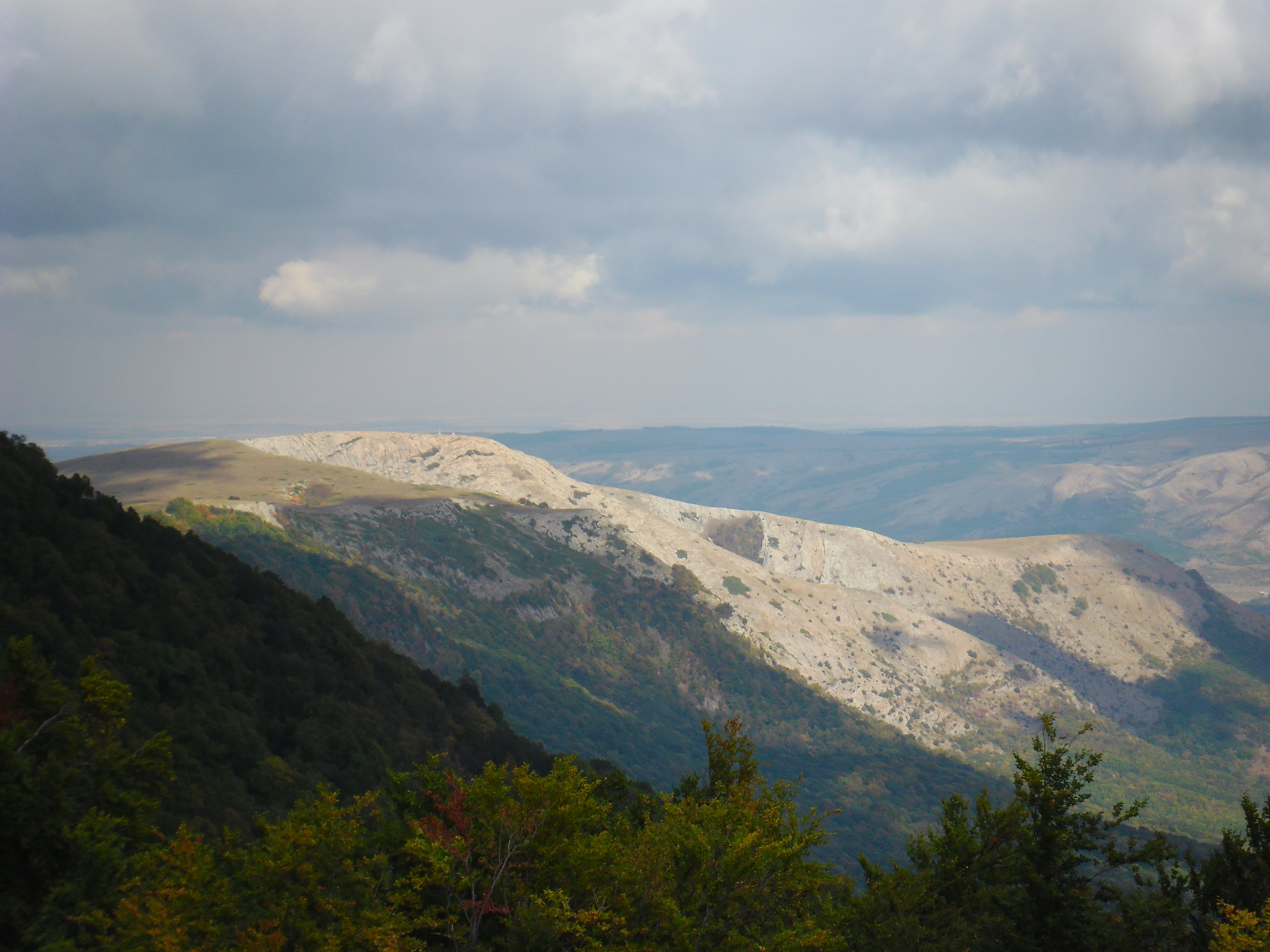 Дон._театр: Фото